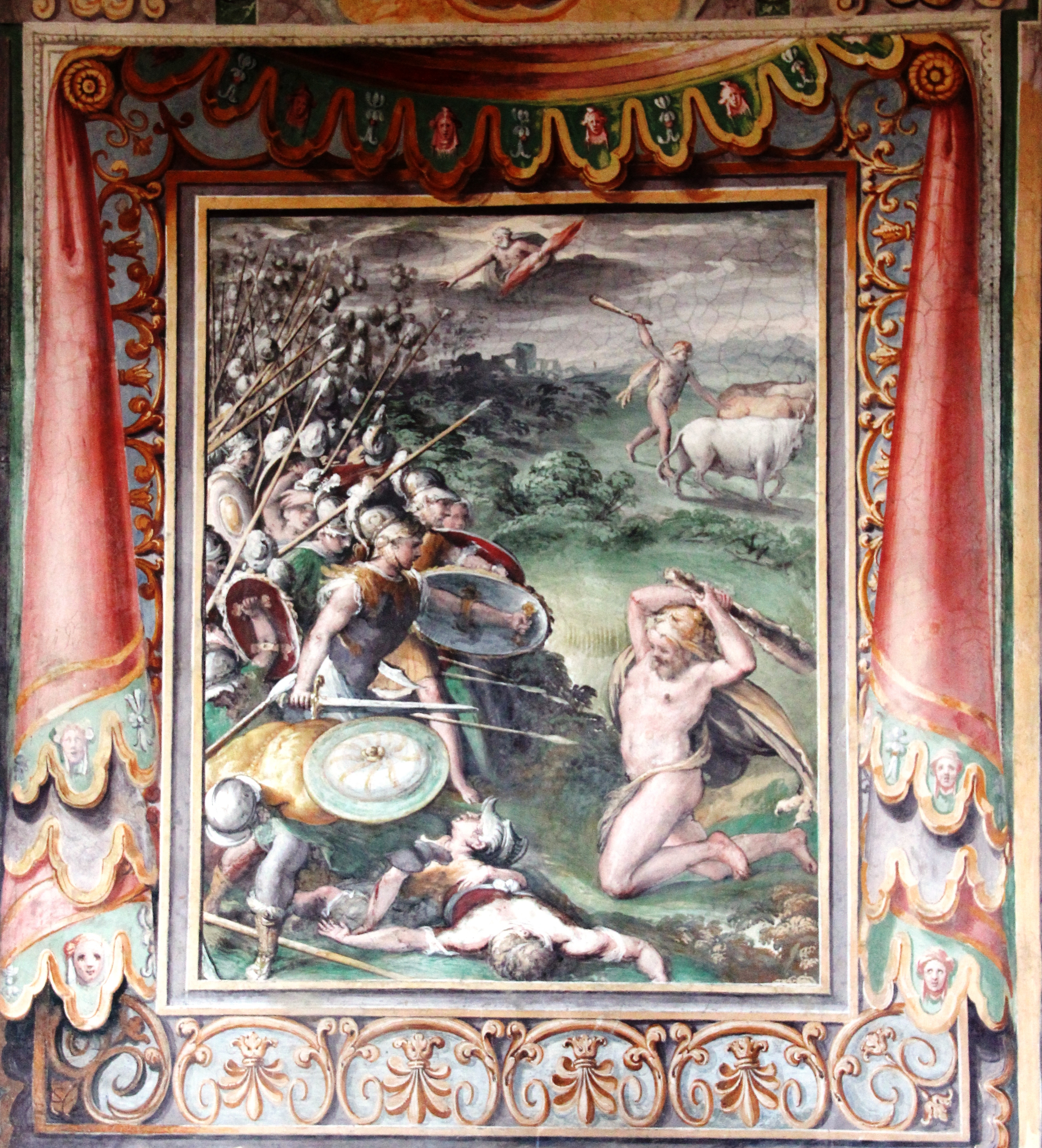 Affresco raffigurante Ercole Sassano, 1569, villa d'Este a Tivoli, appartamento inferiore, prima stanza tiburtina, riquadro centrale.